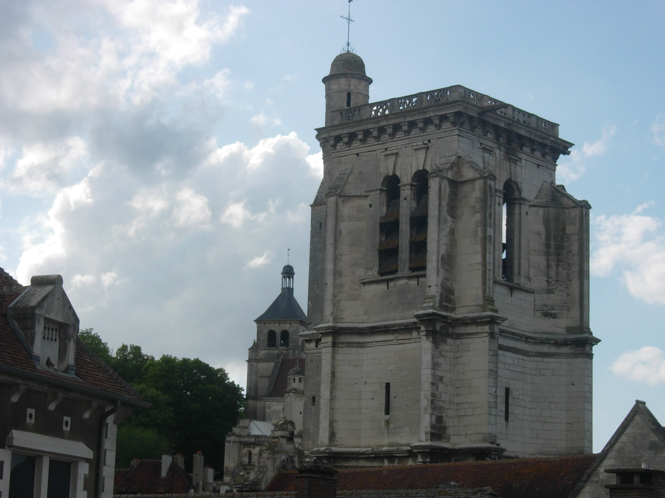 Les deux clochers de Tonnerre (Yonne)